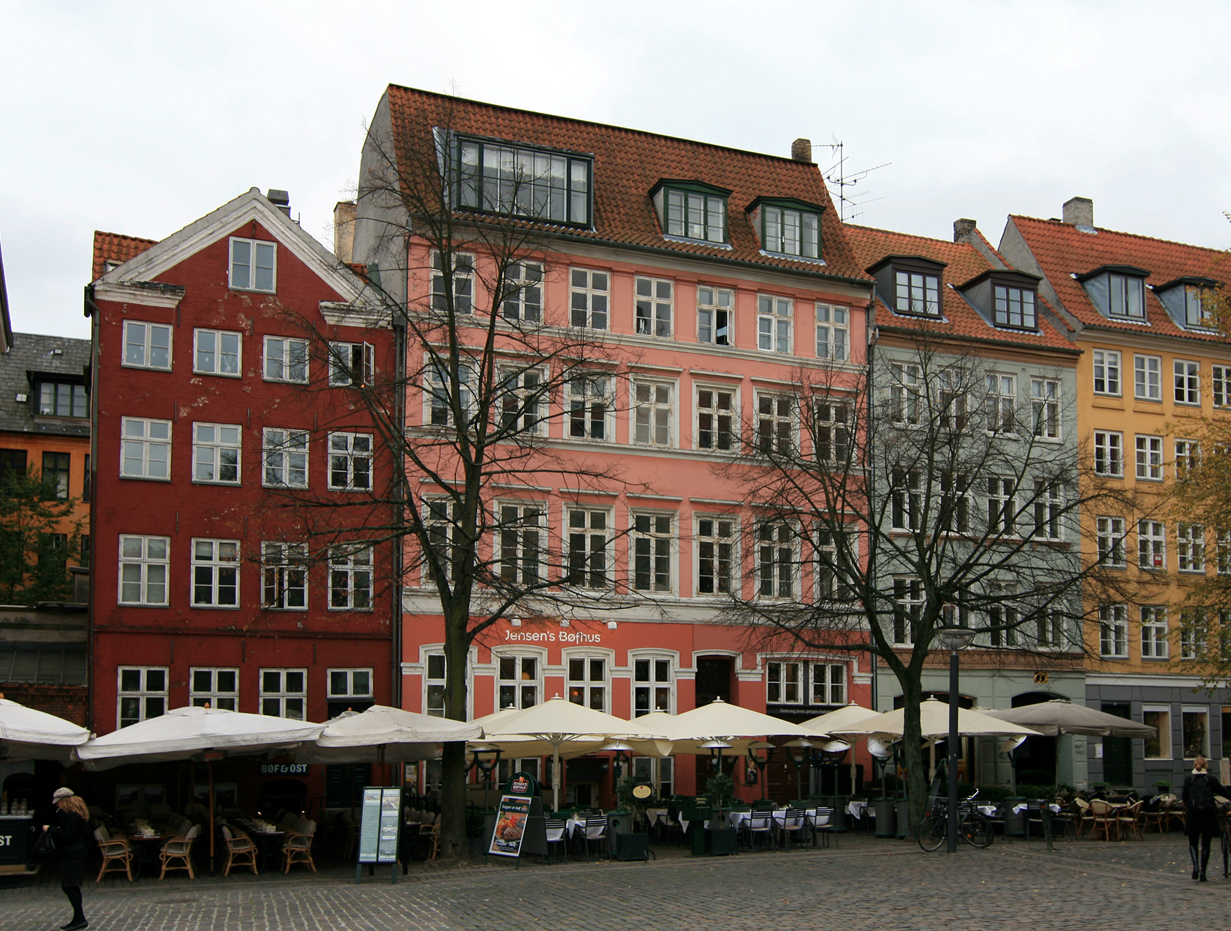 Del af Gråbrødretorvs søndre side, København. Fra venstre: Nr.13, bygget 1732. Nr.15, bygget 1860. Nr.17, bygget 1857. Alle fredet.